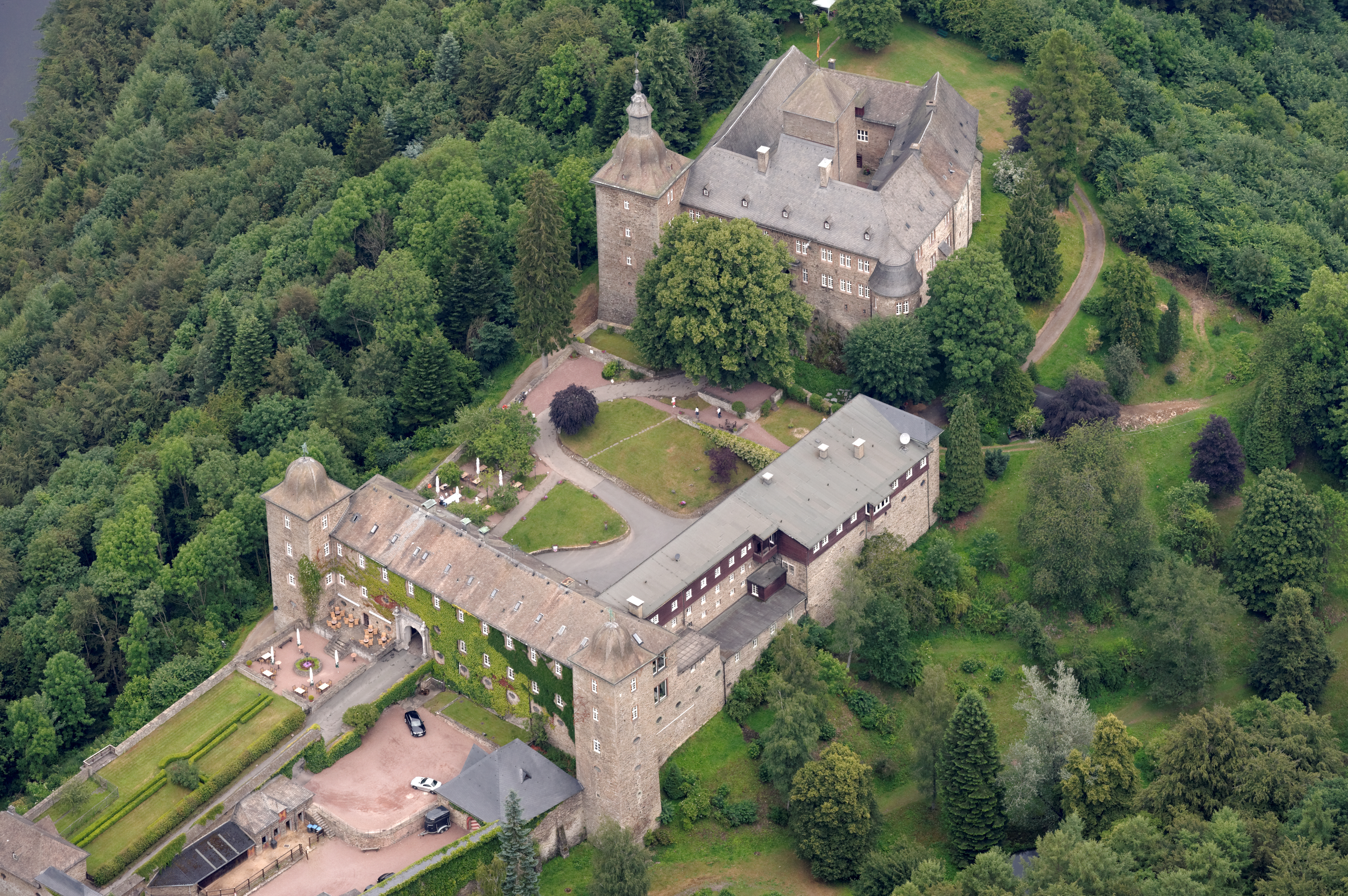 Fotoflug Sauerland Nord. Attendorn: Burg Schnellenberg The making of this document was supported by the Community-Budget of Wikimedia Germany.